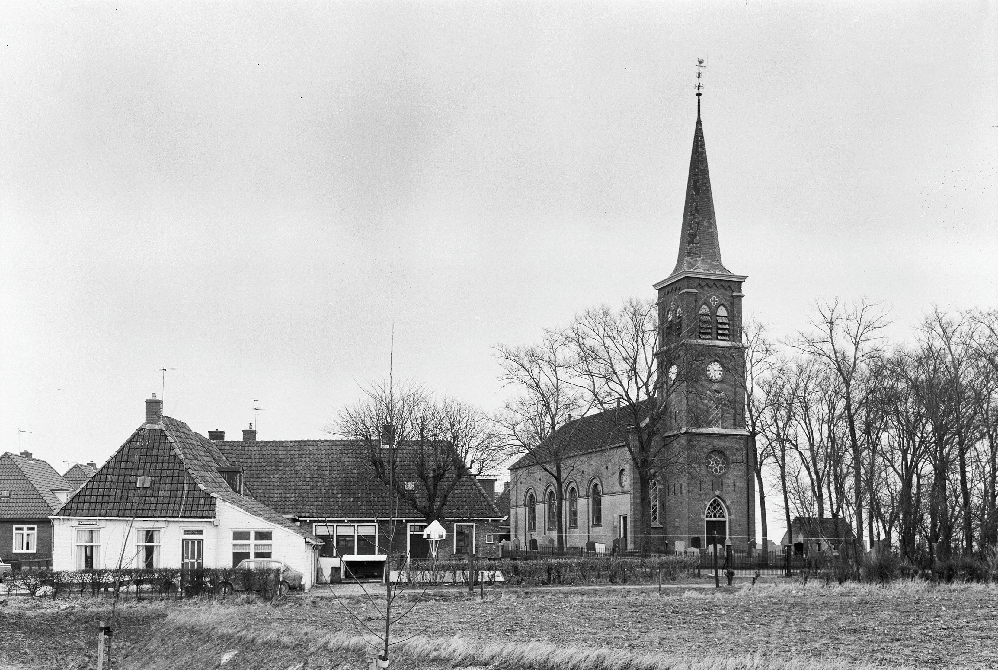 Nederlands Hervormde Kerk: overzicht